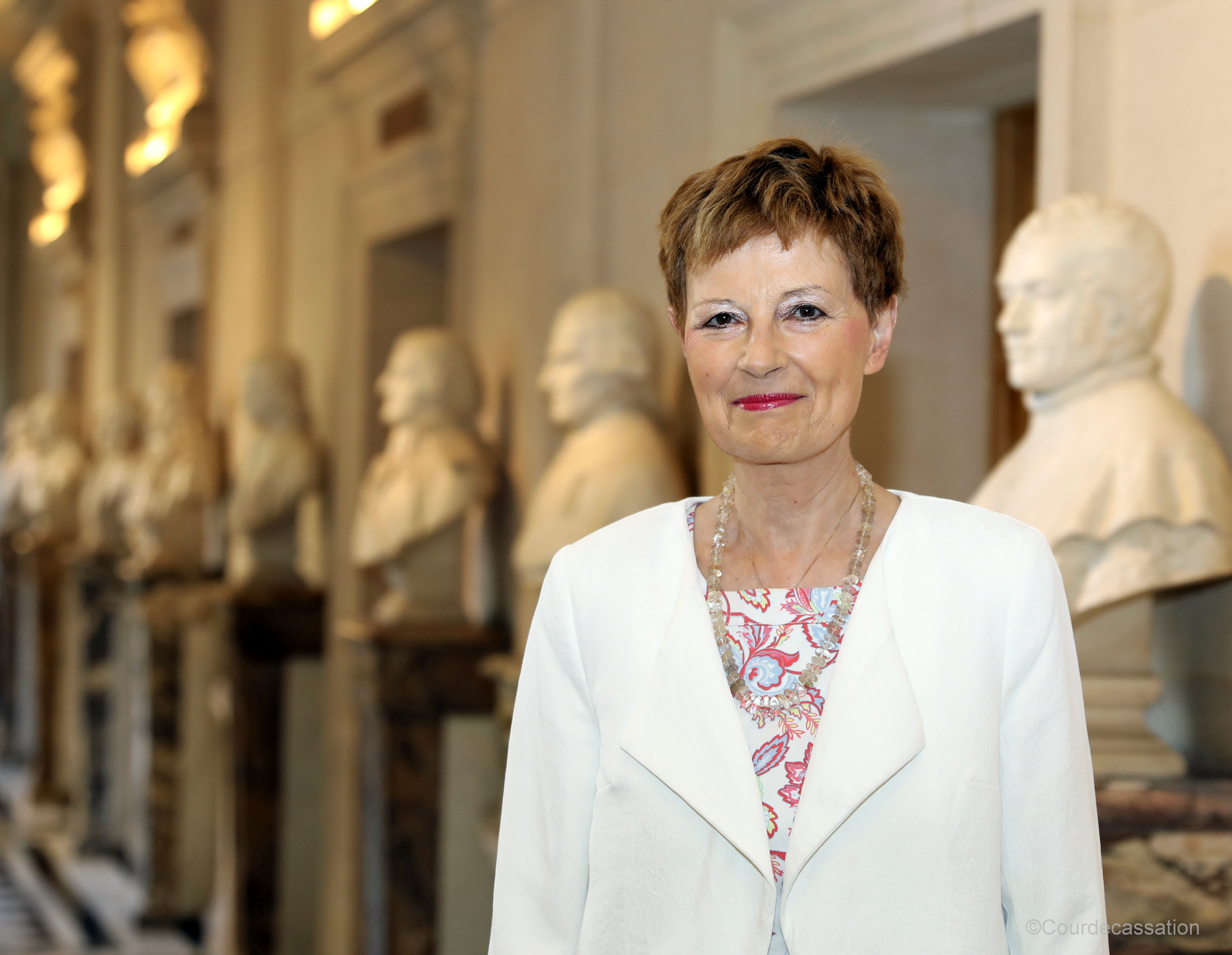 Photographie de Madame Chantal Arens, Première Présidente de la Cour de cassation française